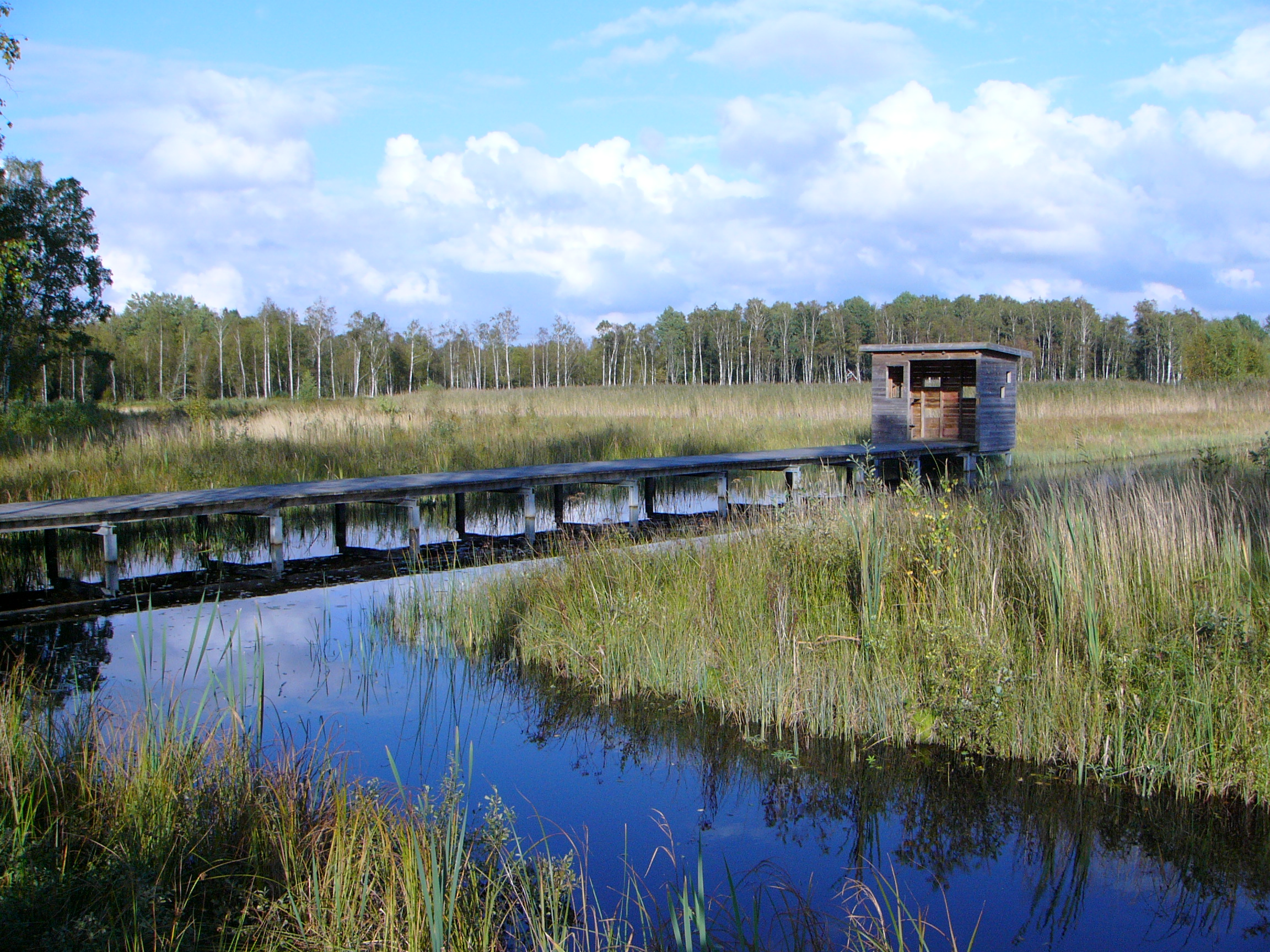 Gömsle vid Svankälla våtmarkspark, Göteborgs kommun, Västra Götalands län, Sverige